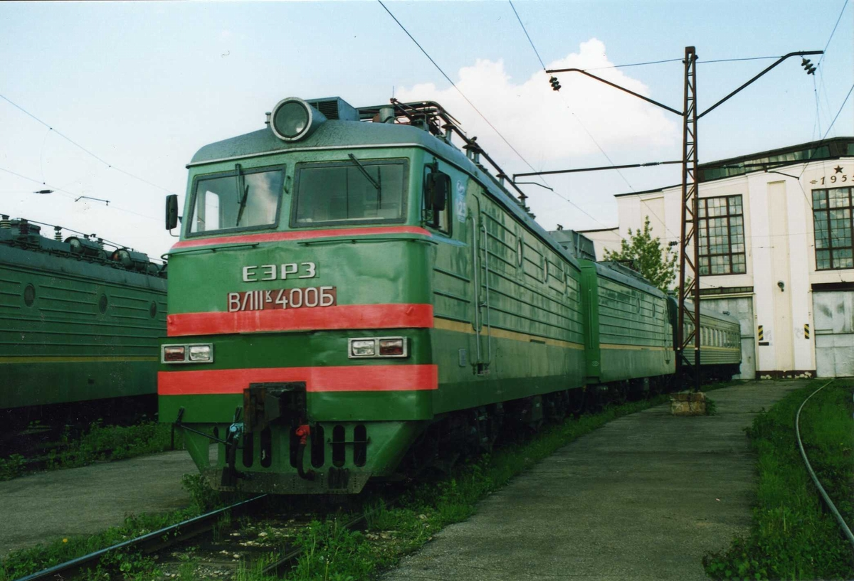 В начале 2004 года прошёл КРП на ЕЭРЗ, после чего получил индекс К